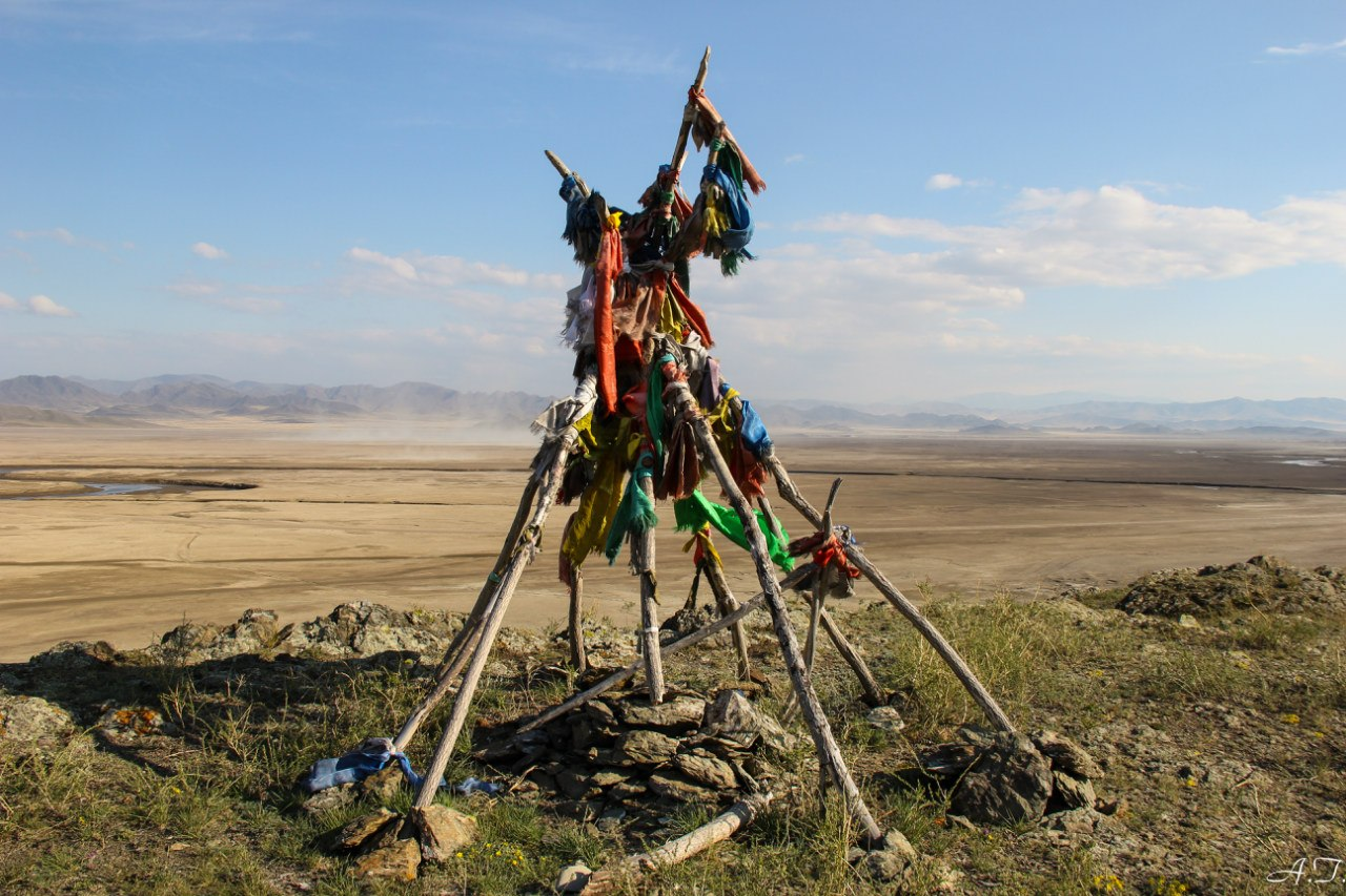 Чаа-Хольский район местечко Бурган даа